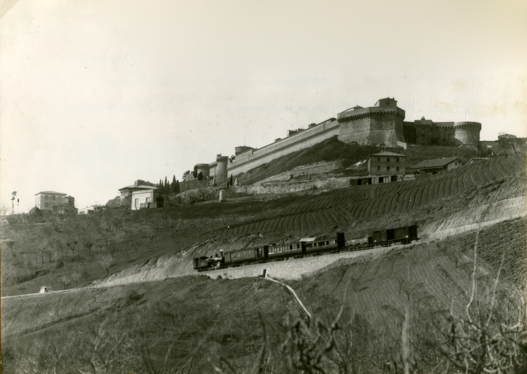 Un convoglio è quasi giunto alla stazione di Volterra